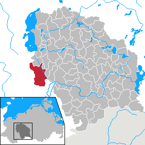 Banzkow in Mecklenburg-Vorpommern - District Parchim